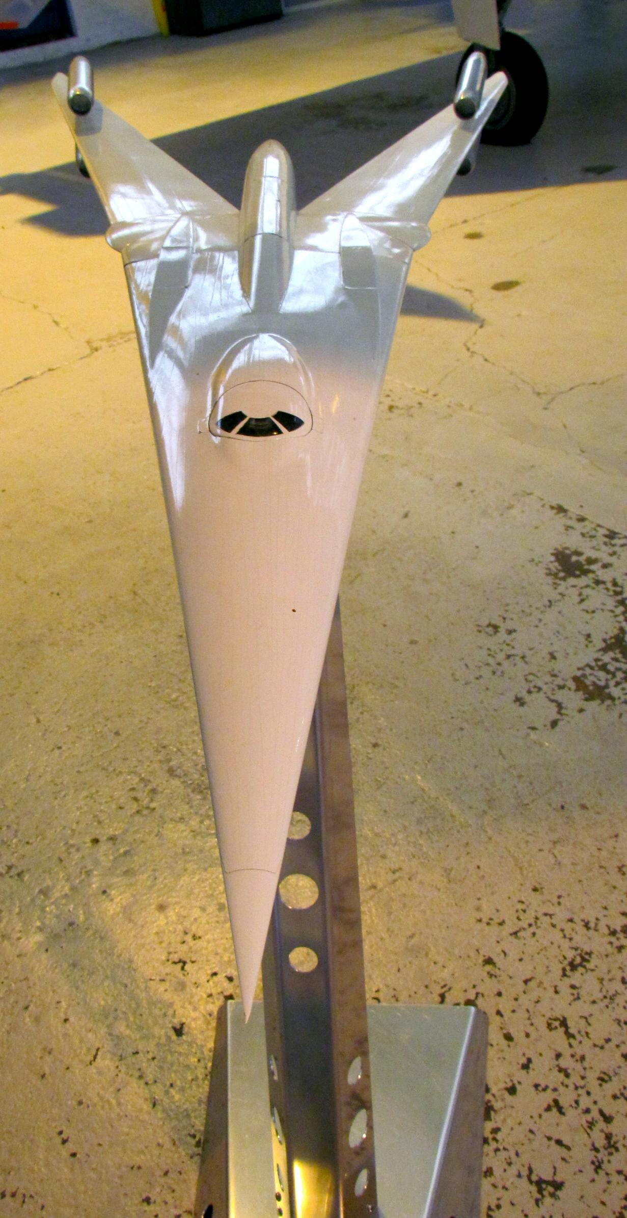 Vickers Type 010